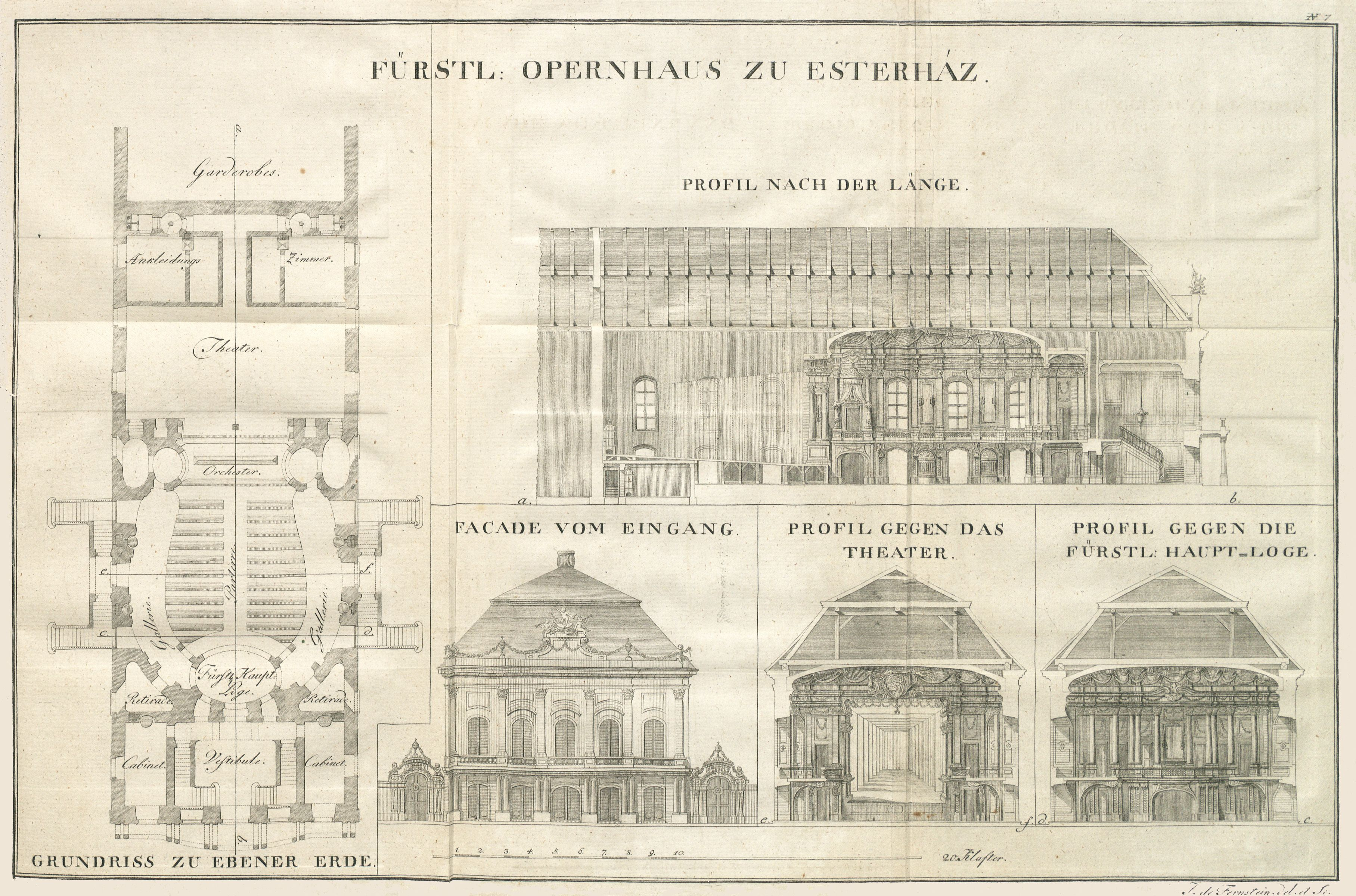 Zeichnung zum ehemaligen Opernhaus am Park von Schloss Esterháza in Fertöd